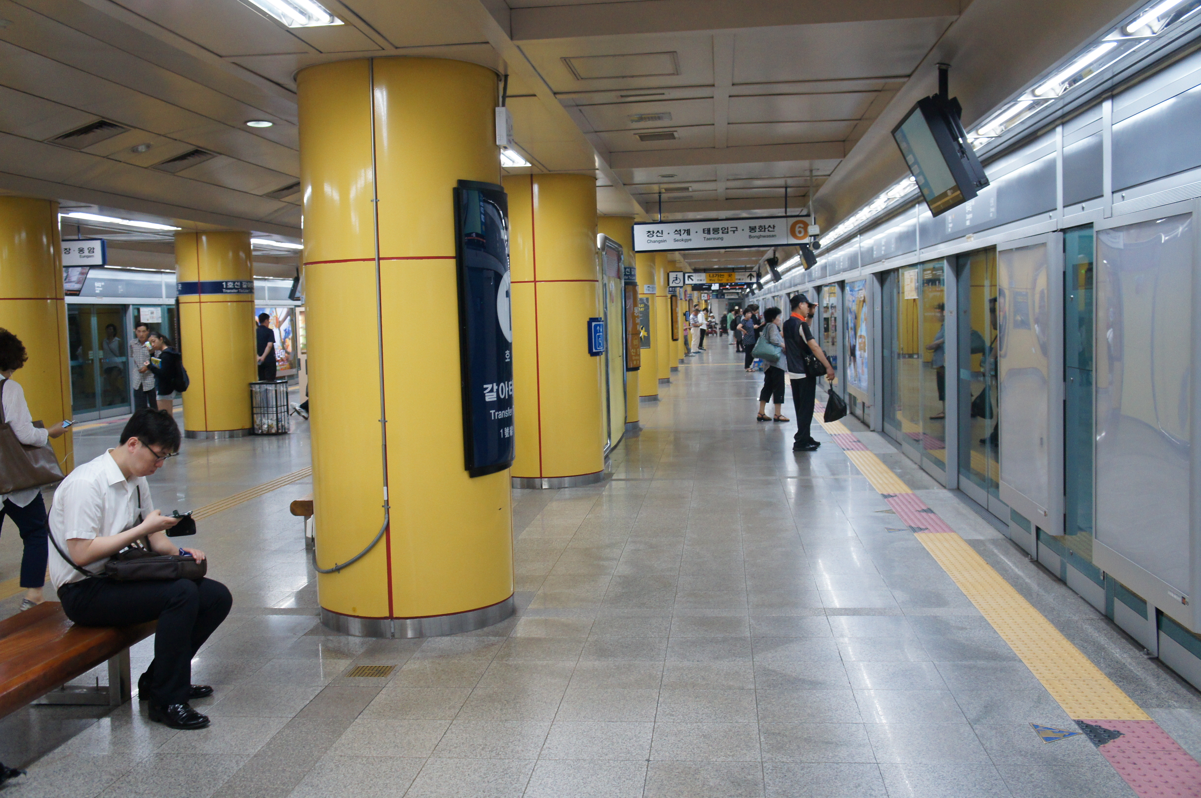 6호선 동묘앞역 승강장